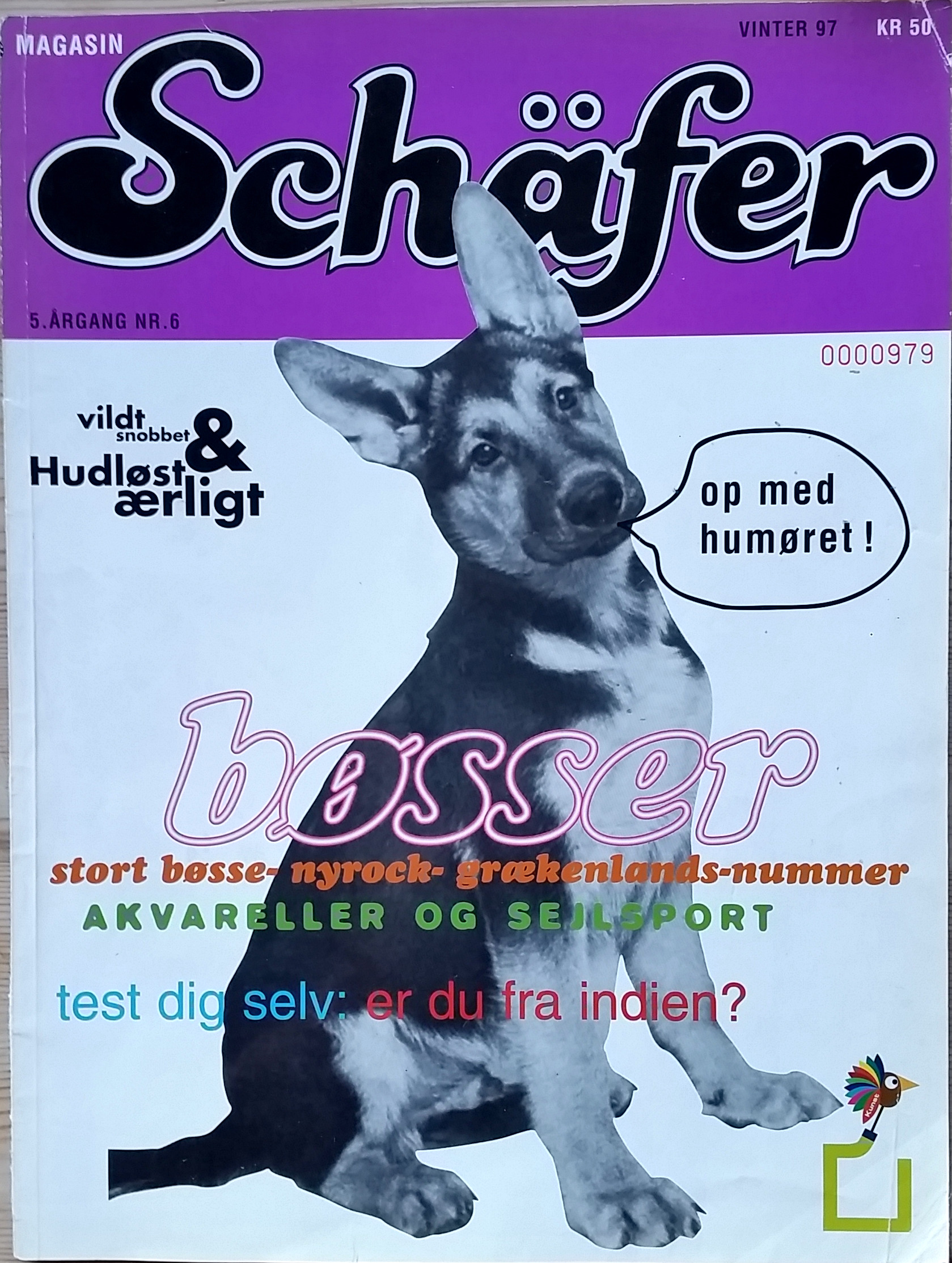 Cover